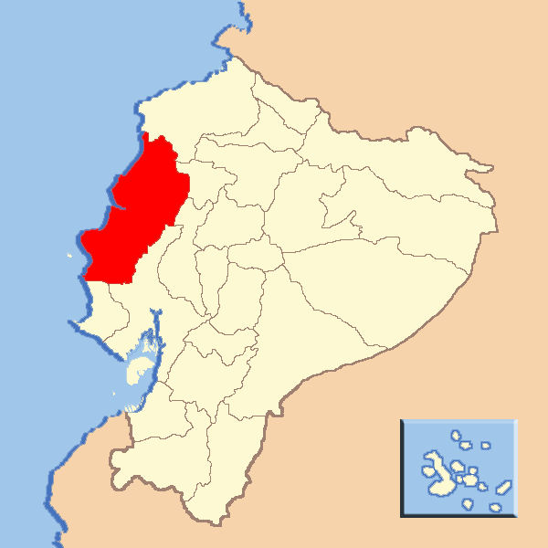 Provincia de Manabí